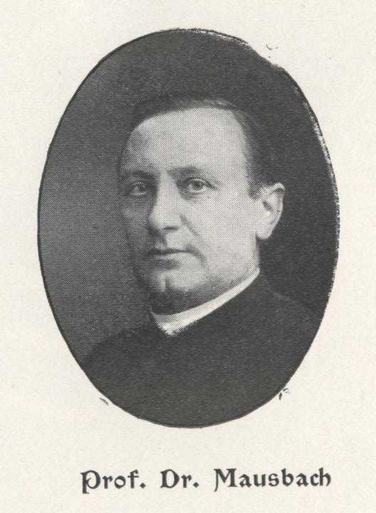 Dr. Joseph Mausbach, Priester und Zentrumsabgeordneter im Reichstag